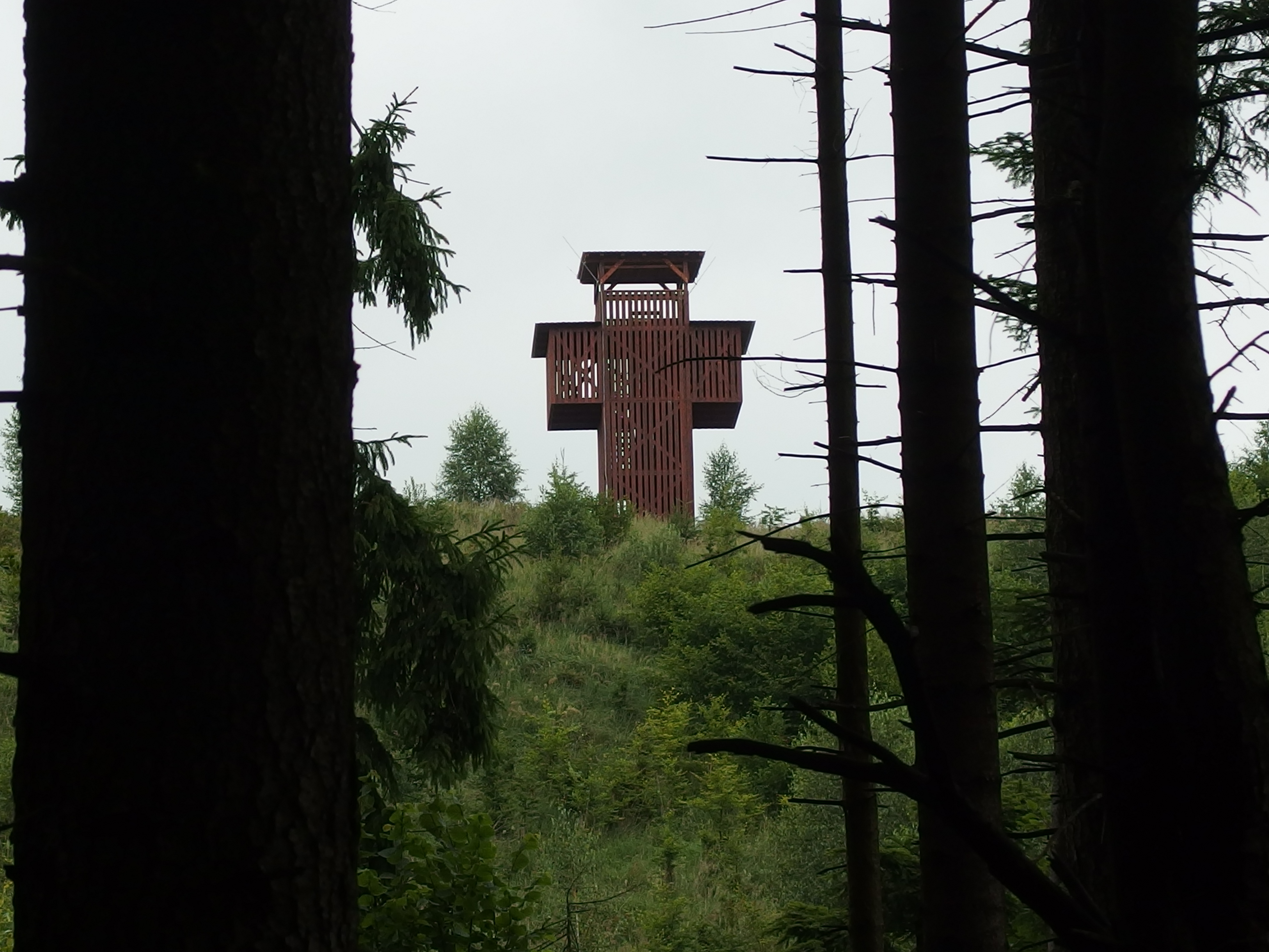 Kríž-rozhľadňa